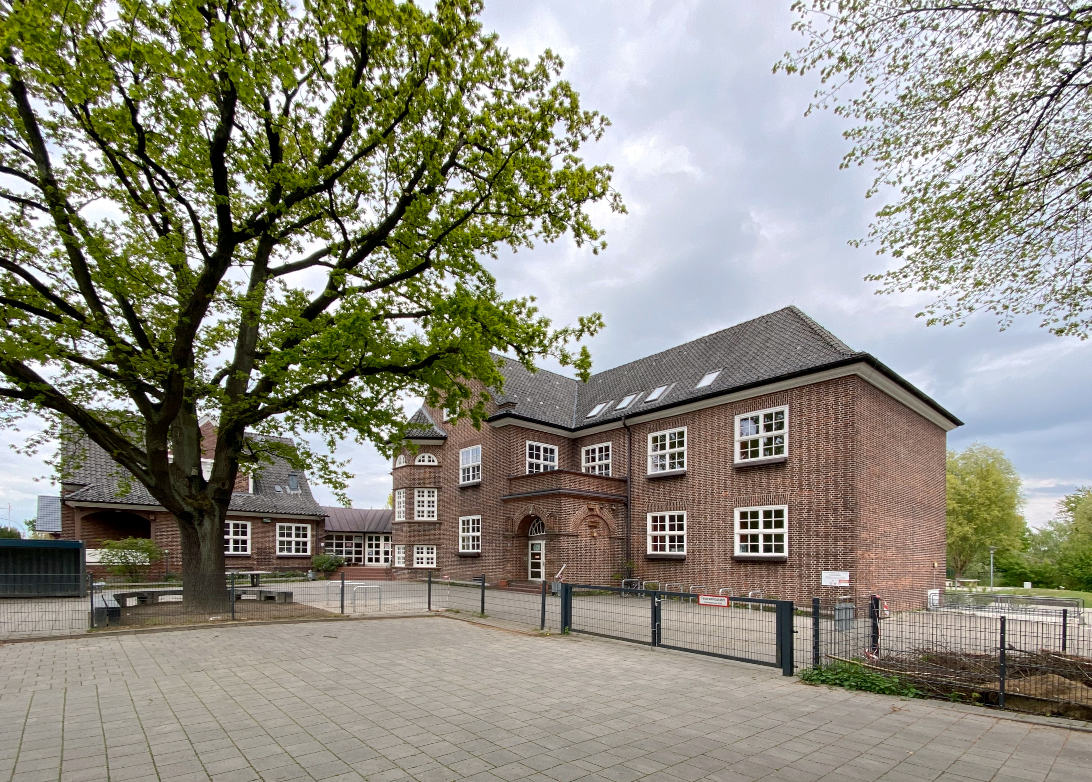 Schule Zollenspieker in Hamburg-Kirchwerder, schräge Ansicht des Altbaus vom Kirchenheerweg aus.